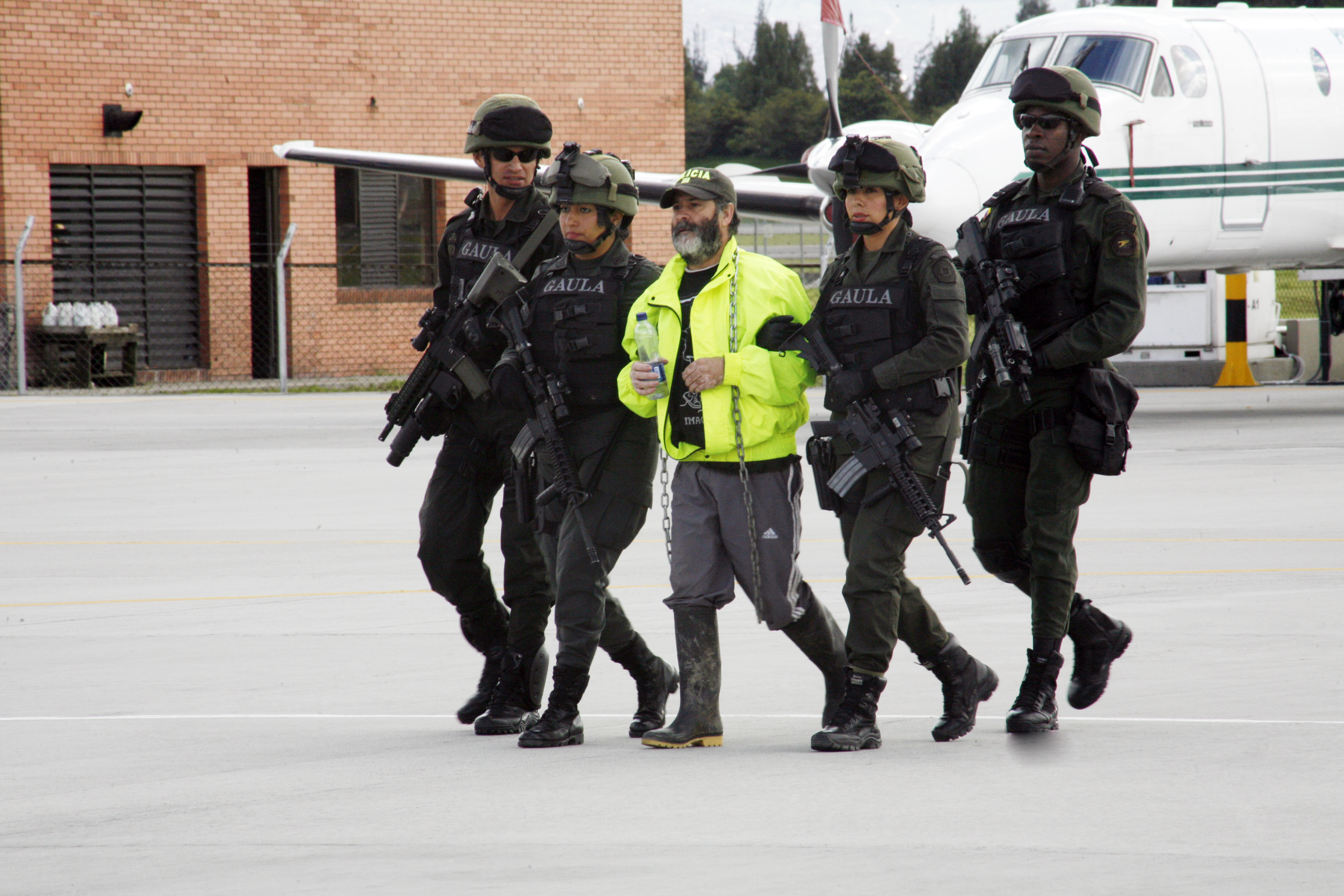 Pedían mil quinientos millones de pesos, La víctima llevaba 55 días secuestrado. Durante el operativo se capturaron dos secuestradores.